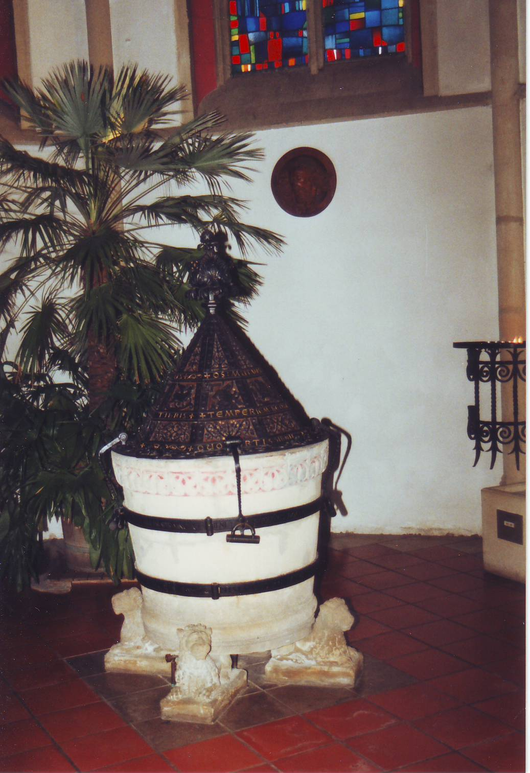 Taufbecken St. Felizitas Kirche